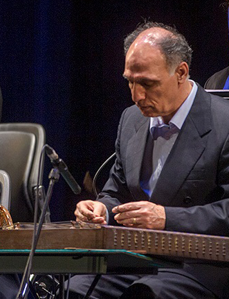 سعید ثابت سی و چهارمین جشنواره موسیقی فجر ۲۷ بهمن ۱۳۹۷